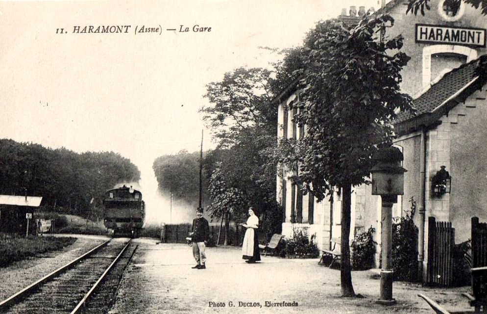 Train arrivant dans la halte de Haramont.